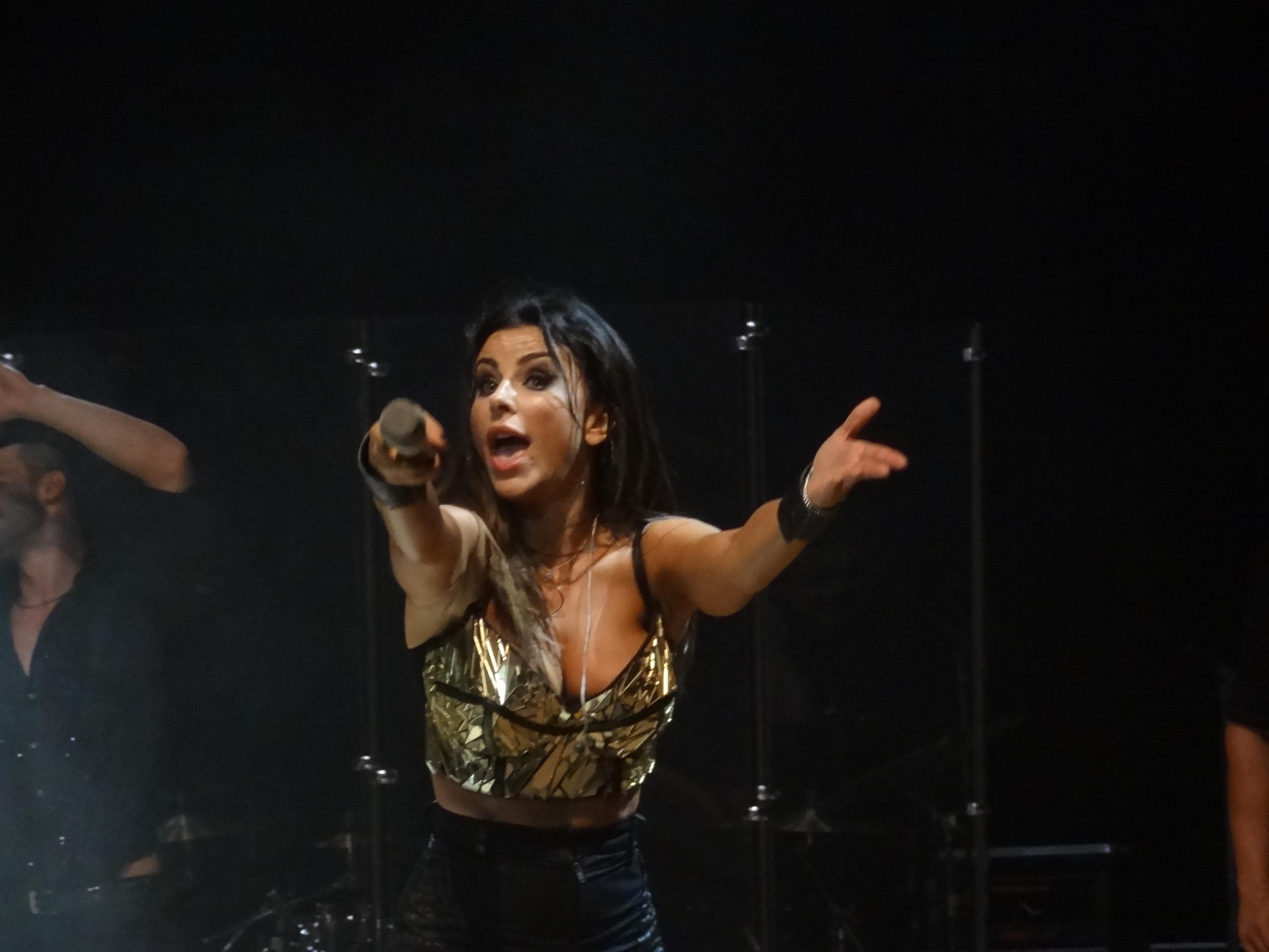 Концерт Ani Lorak в Сочи, 2014